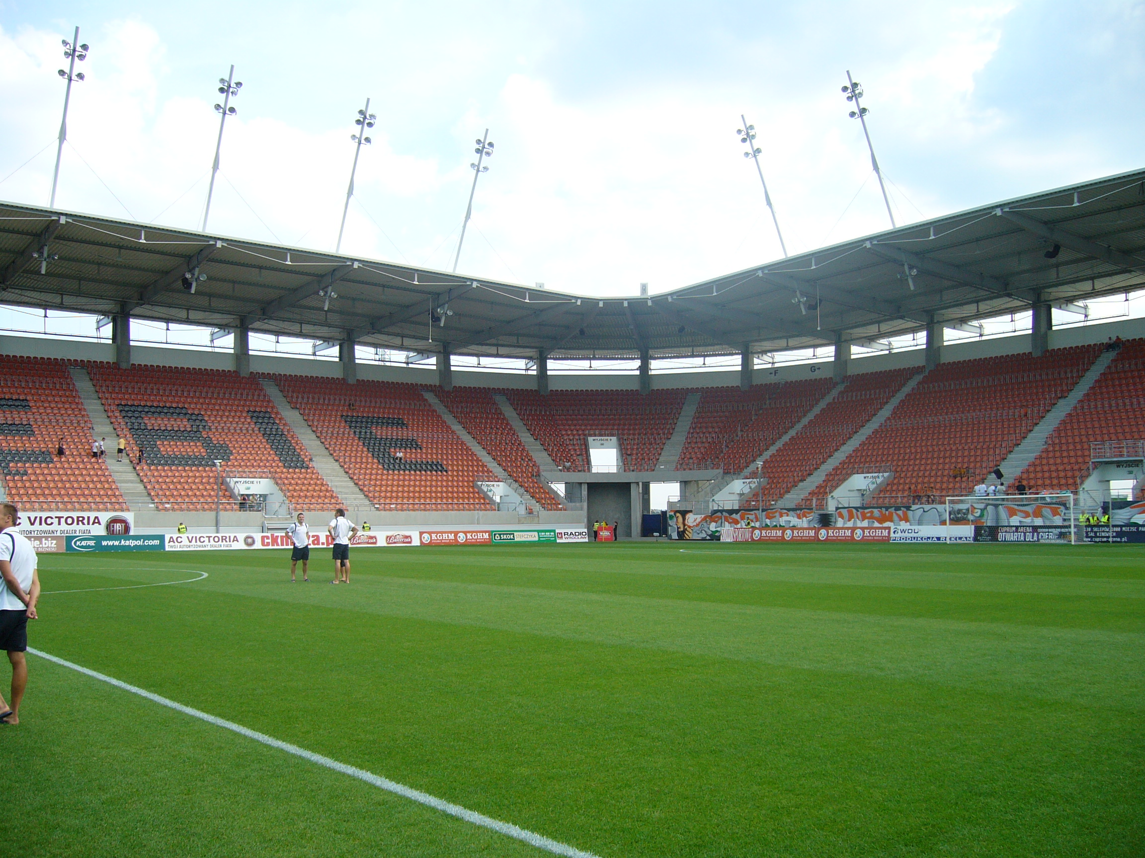 Dialog Arena w pełnej krasie